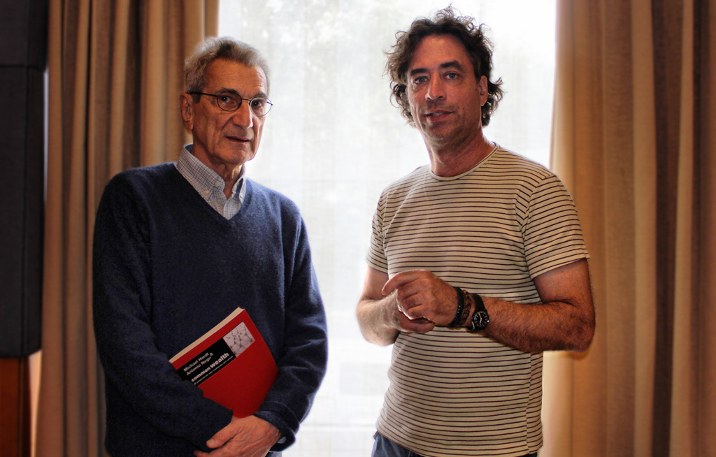 Antonio Negri y Michael Hardt en la presentación de Commonwealth (Akal, 2011) en Madrid